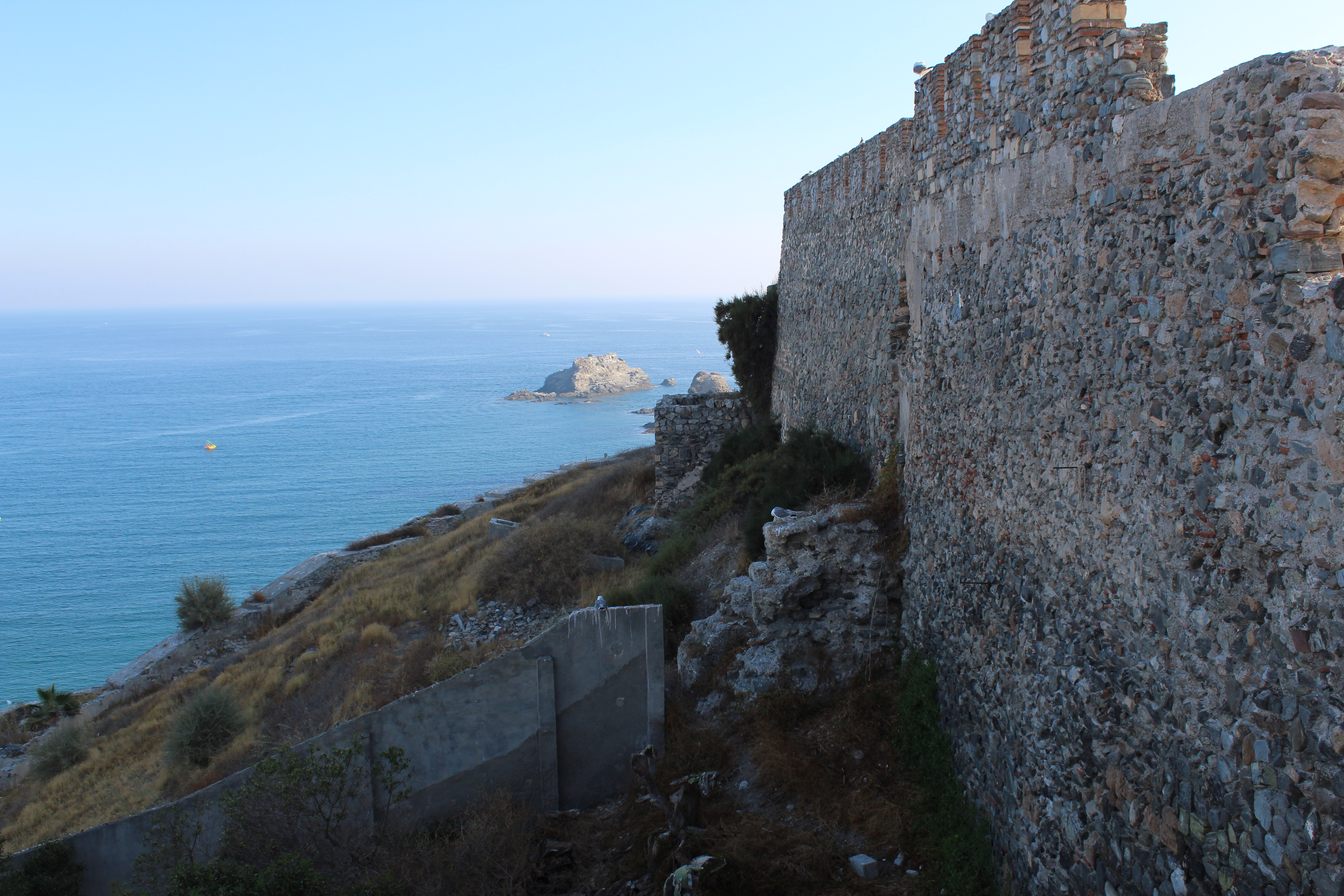 Vista del peñón del Santo y de la muralla del castillo de San Miguel.